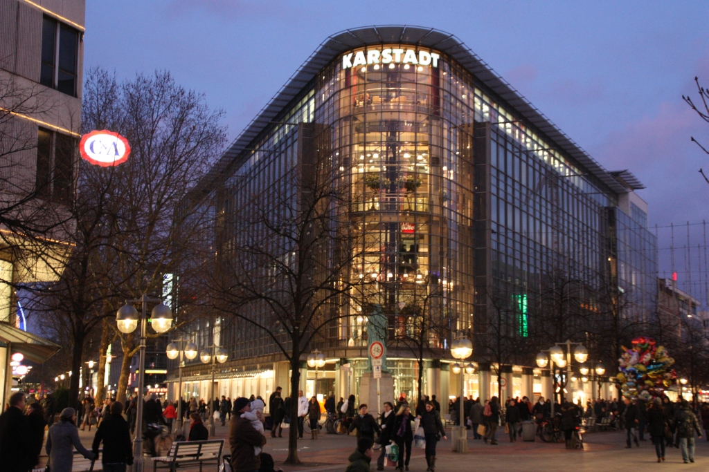 Karstadt in Hannover am Abend